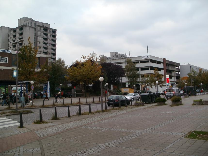 Straße Kandinskyallee in der Großsiedlung Mümmelmannsberg im Stadtteil Hamburg-Billstedt.